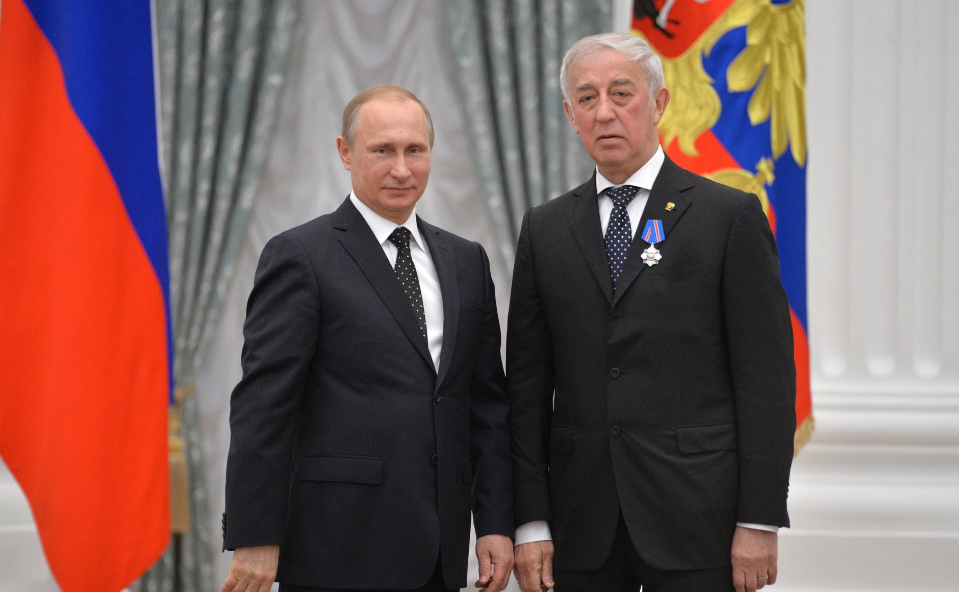 Церемония вручения государственных наград Российской Федерации. Генеральный директор научно-производственного центра автоматики и приборостроения имени академика Н.А.Пилюгина Ефим Межирицкий награждён орденом «За военные заслуги»